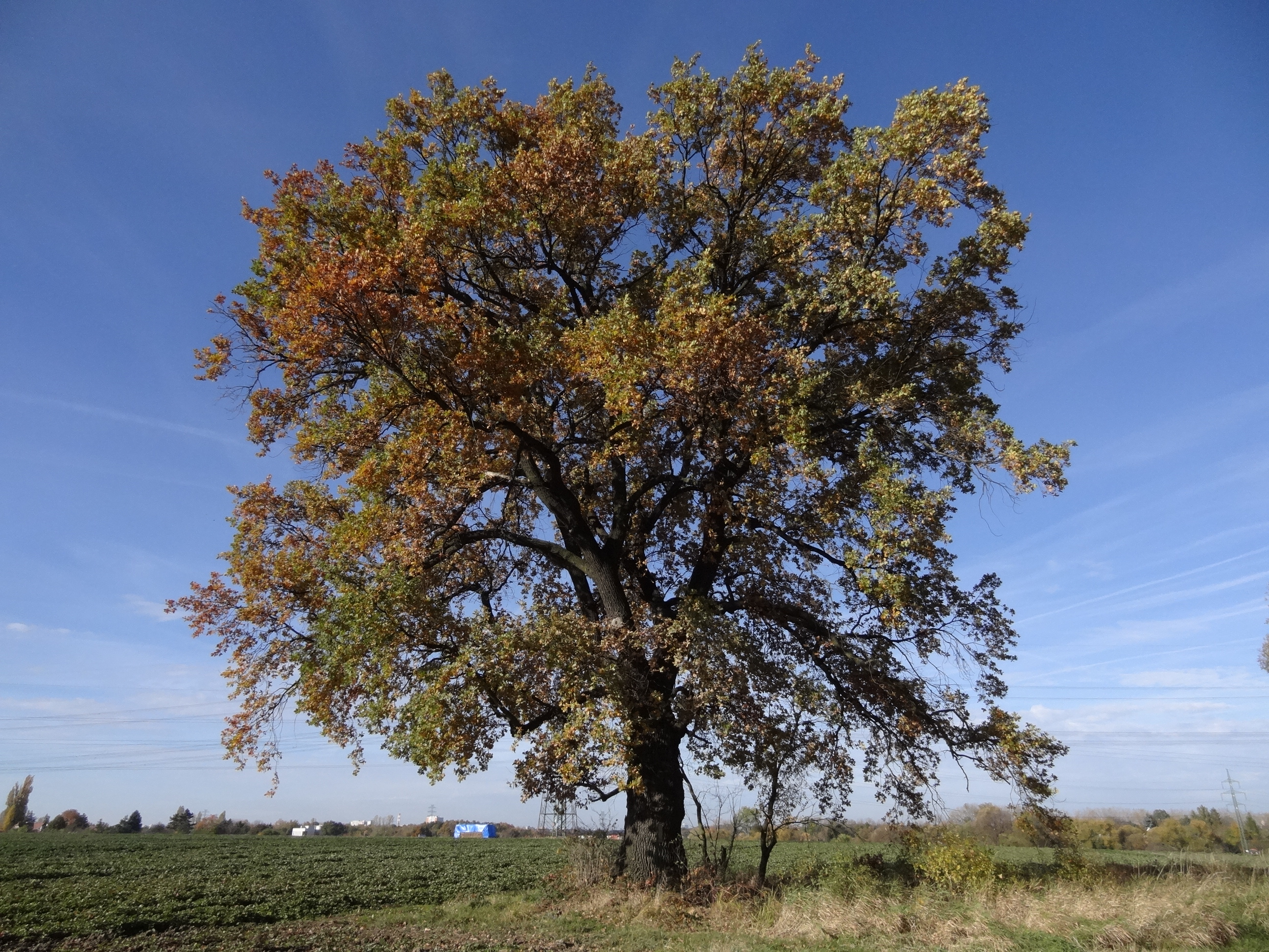 Kunratice - památný dub letní U Vesteckých